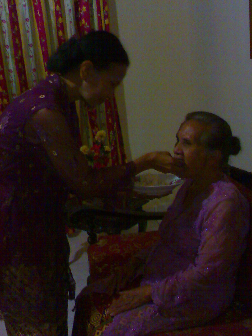 salah seorang anak perempuan sedang memberikan suapan kepada ibunya dalam upacara manuangi natua-tua